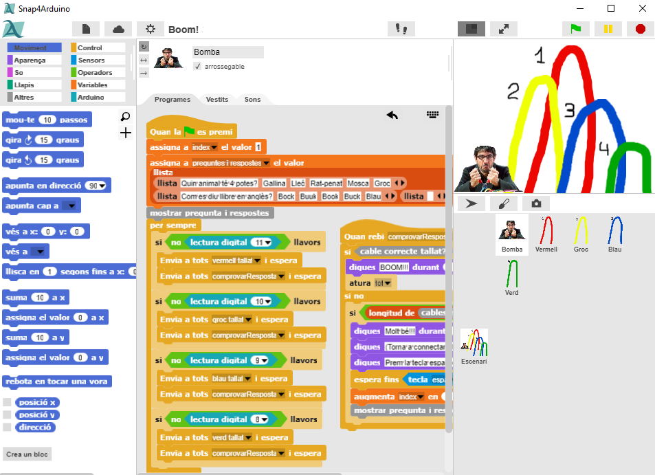 Snap4Arduino és una modificació de snap! amb blocs específics per a interactuar amb plaques Arduino.